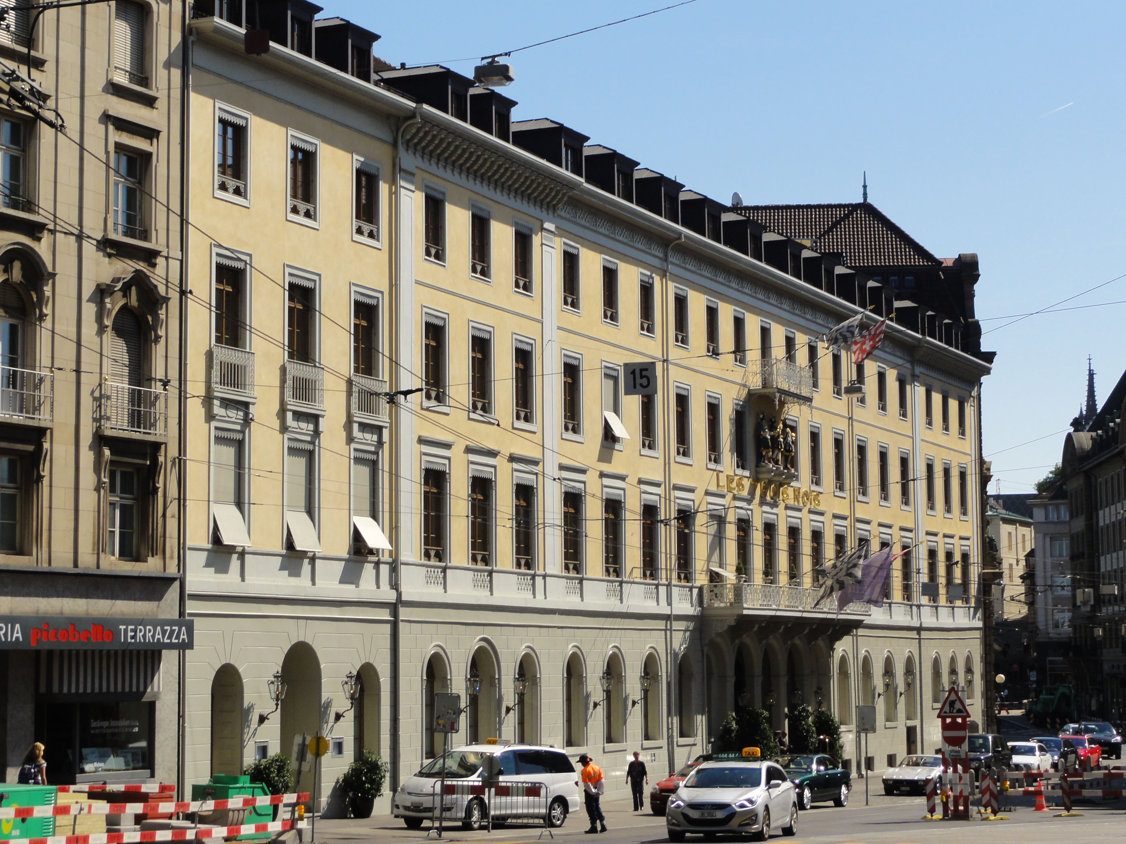 Basel Stadt — Hotel Les Trois Rois EXIF data with GPS coordinates and magnetic direction. GPS data may be inaccurate.